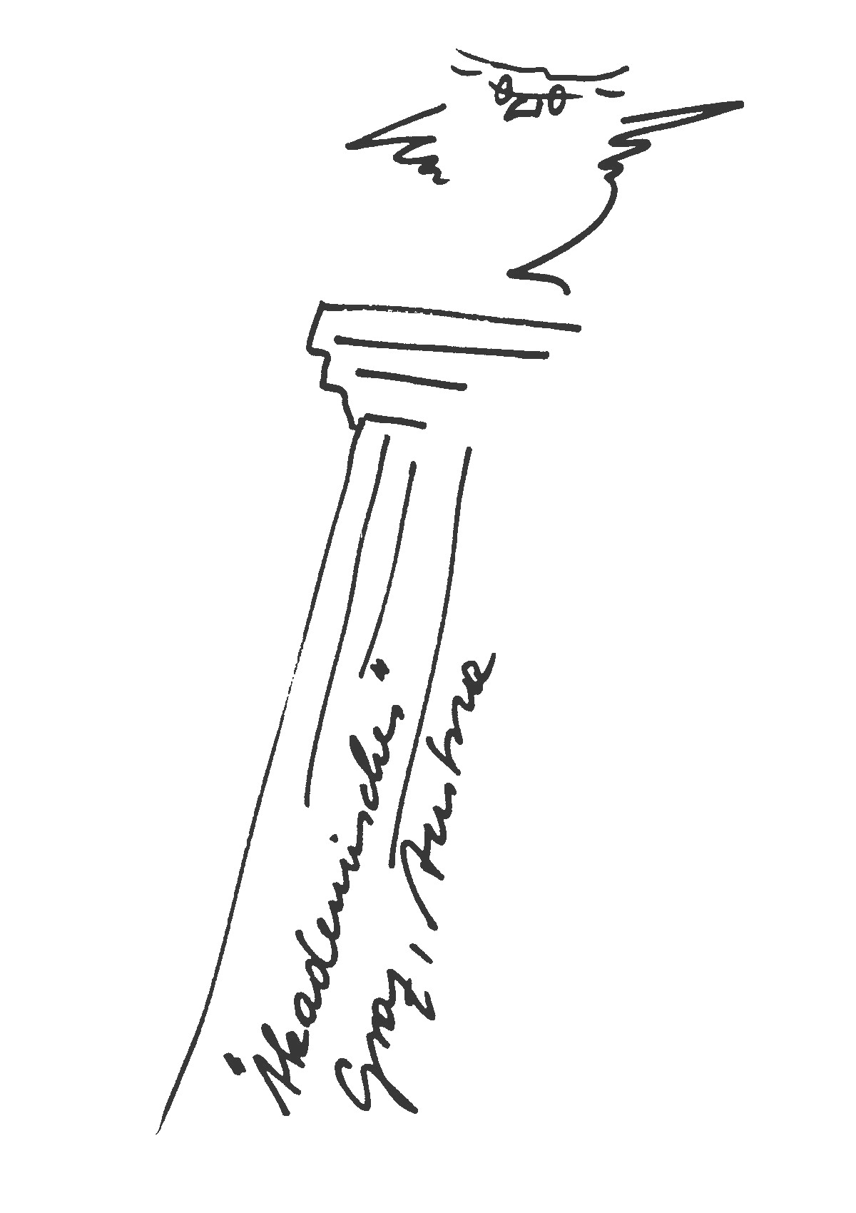 Akademisches Gymnasium Graz, Schullogo "Die Eule auf der Säule" von Hartmut Urban - Erstveröffentlicht mit ausdrücklicher Genehmigung des Künstlers in: Jahresbericht des Akademischen Gymnasiums Graz, 1994/95, Herausgegeben vom Akademischen Gymnasium Graz, Juli 1995, S. 3. "Akademisches" Graz, Austria